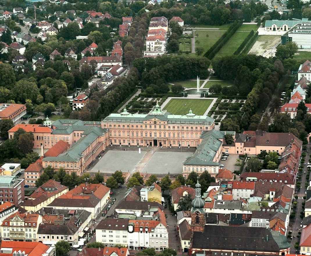 Das Rastatter Schloss. Ein ehemaliges Residenzschloss der Markgrafen von Baden-Baden. Es wurde um 1700 vom italienischen Hofbaumeister Domenico Egidio Rossi erbaut.